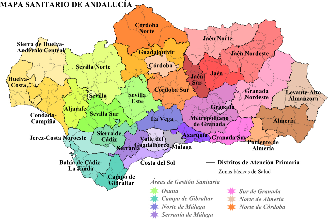 Mapa sanitario de Andalucía